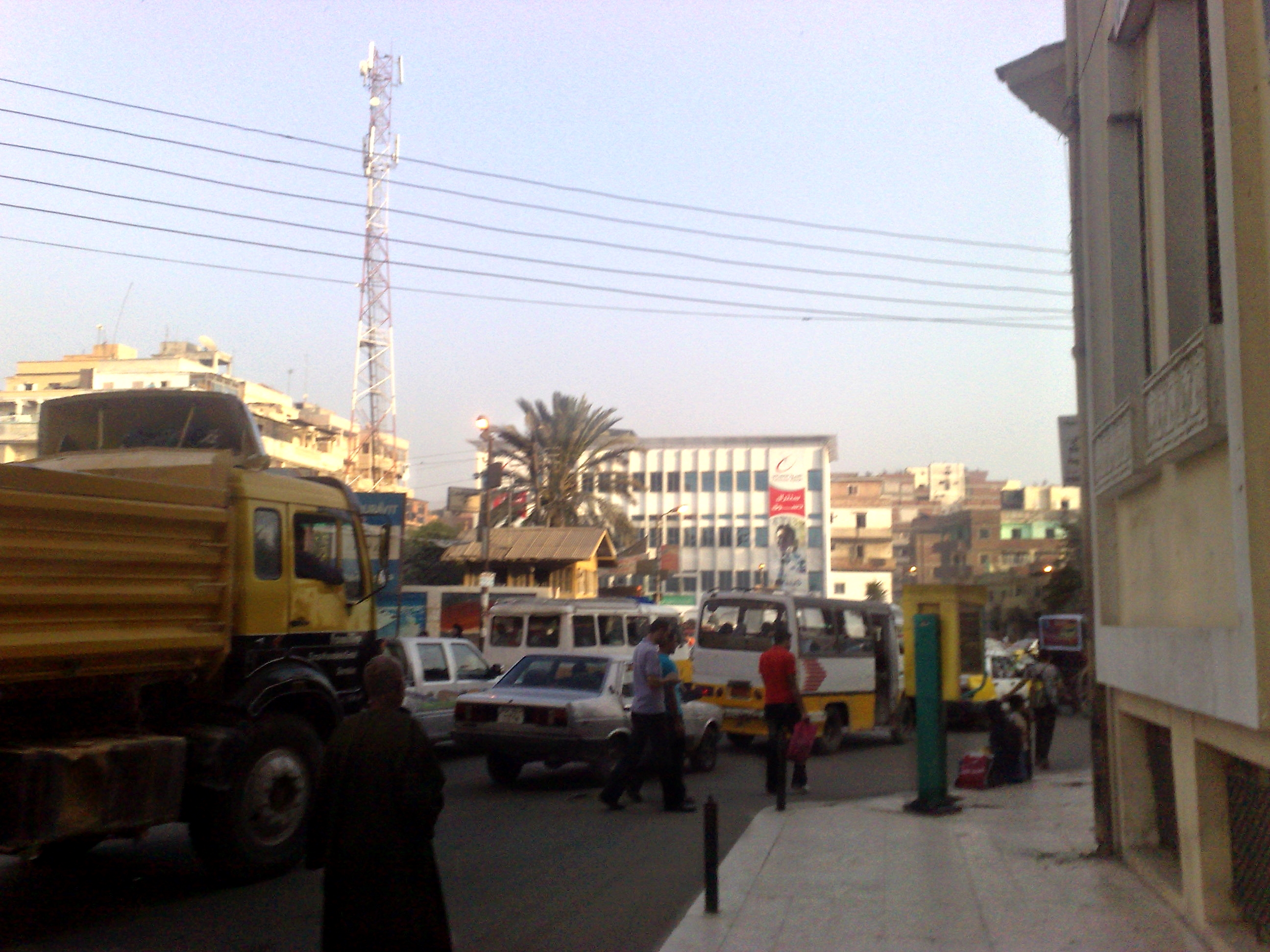 الزحام بمدينة دسوق في الحد الفاصل بين حي شمال وحي جنوب